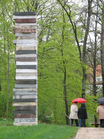 Die Säule wurde aus Grabsteinen, die vom Prag Friedhof in Stuttgart abgebaut wurden, errichtet.